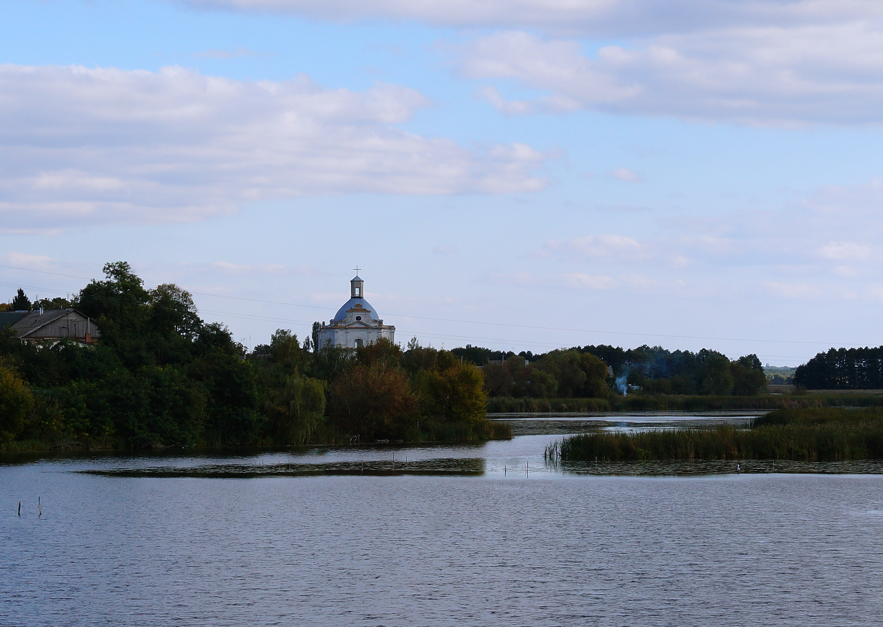 Костьол Св.Домініка, смт. Любар, вул. Калініна, 36